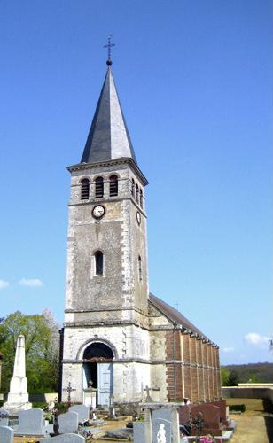 Eglise_Saint-denis_Moulicent_2